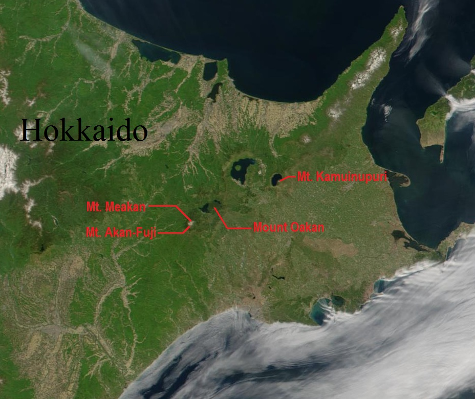 ==Space shot of Hokkaido, with captions of Mt. Meakan, Mt. Oakan, Mt. Akan-Fuji and Mt. Kamuinupuri.